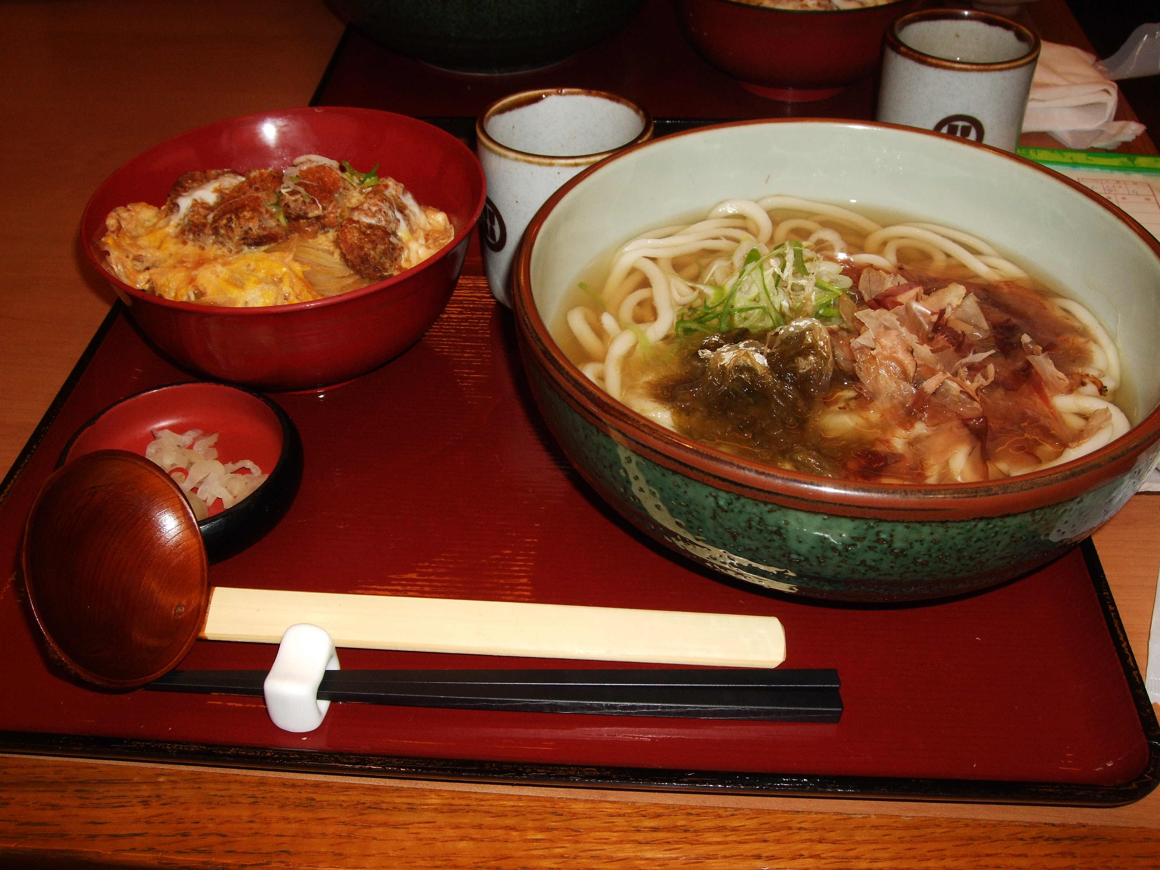 三重県伊勢市岩淵 まんぷく食堂 からあげ丼・うどん